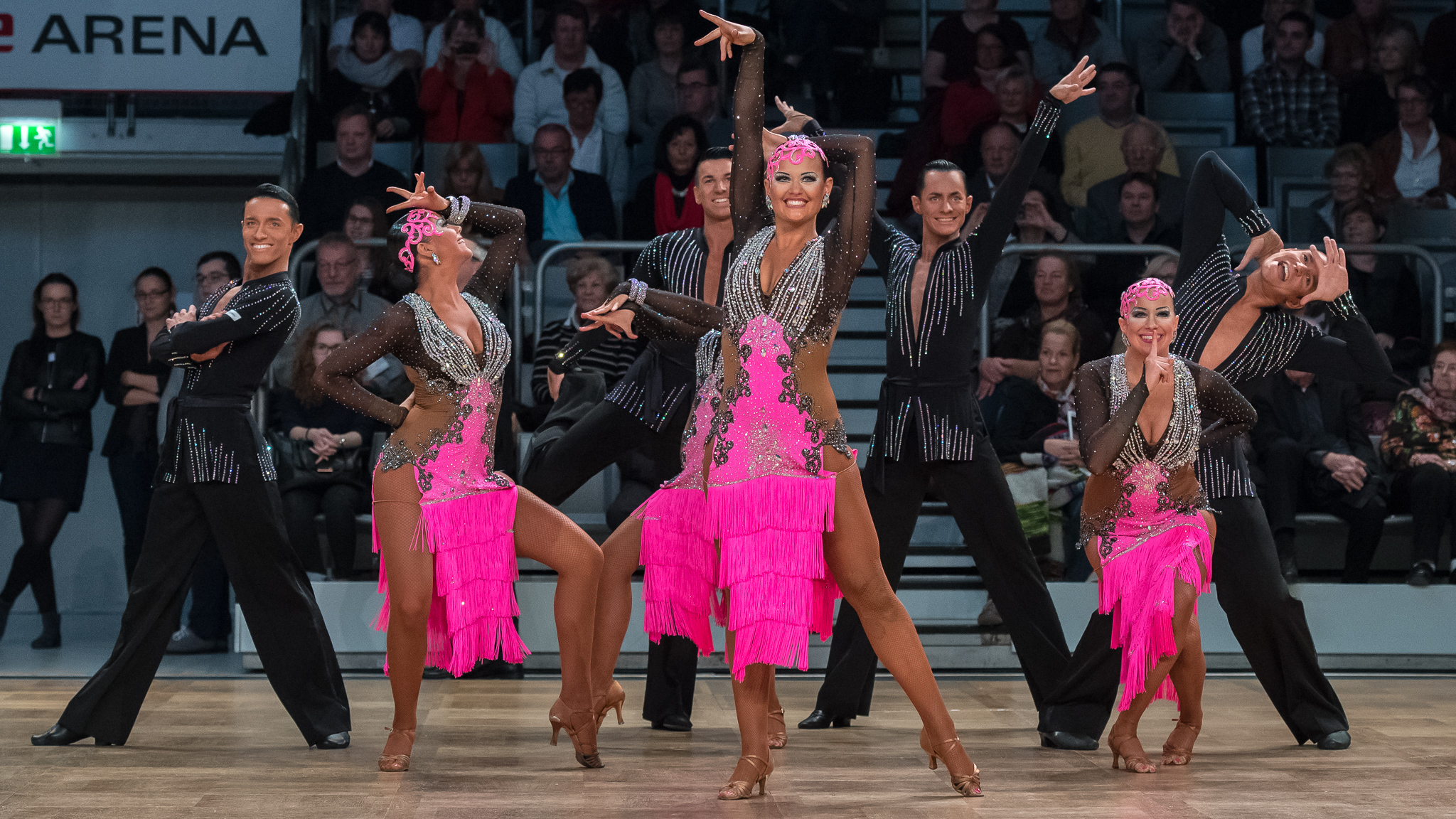 Brose Arena Bamberg,Deutsche Meisterschaften der Formationen Standard & Latein 2016,FG TSZ Aachen/Boston Club Düsseldorf A,Latein,Tanzsport,The great Gatsby